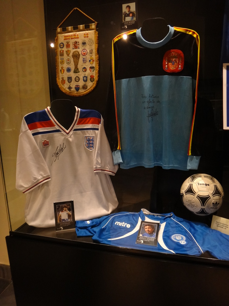 Exposición ‘De Uruguay a Sudáfrica’, Jerez de la Frontera (Andalucía, España)